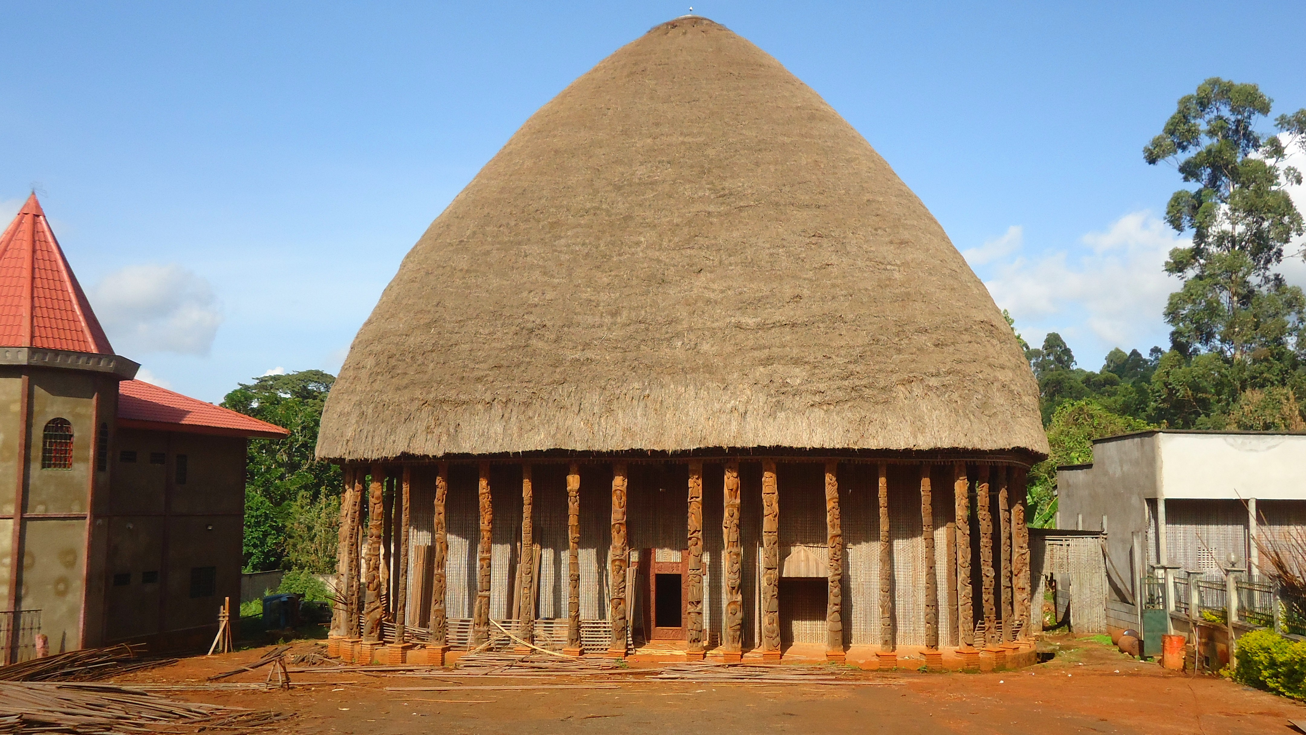 Cette image représente le musée Bandjoun à l'Ouest du Cameroun.